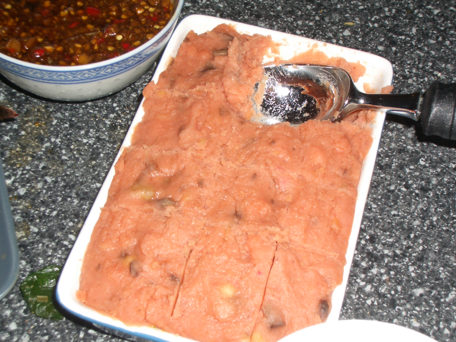 Mung bean (Vigna radiata) dessert